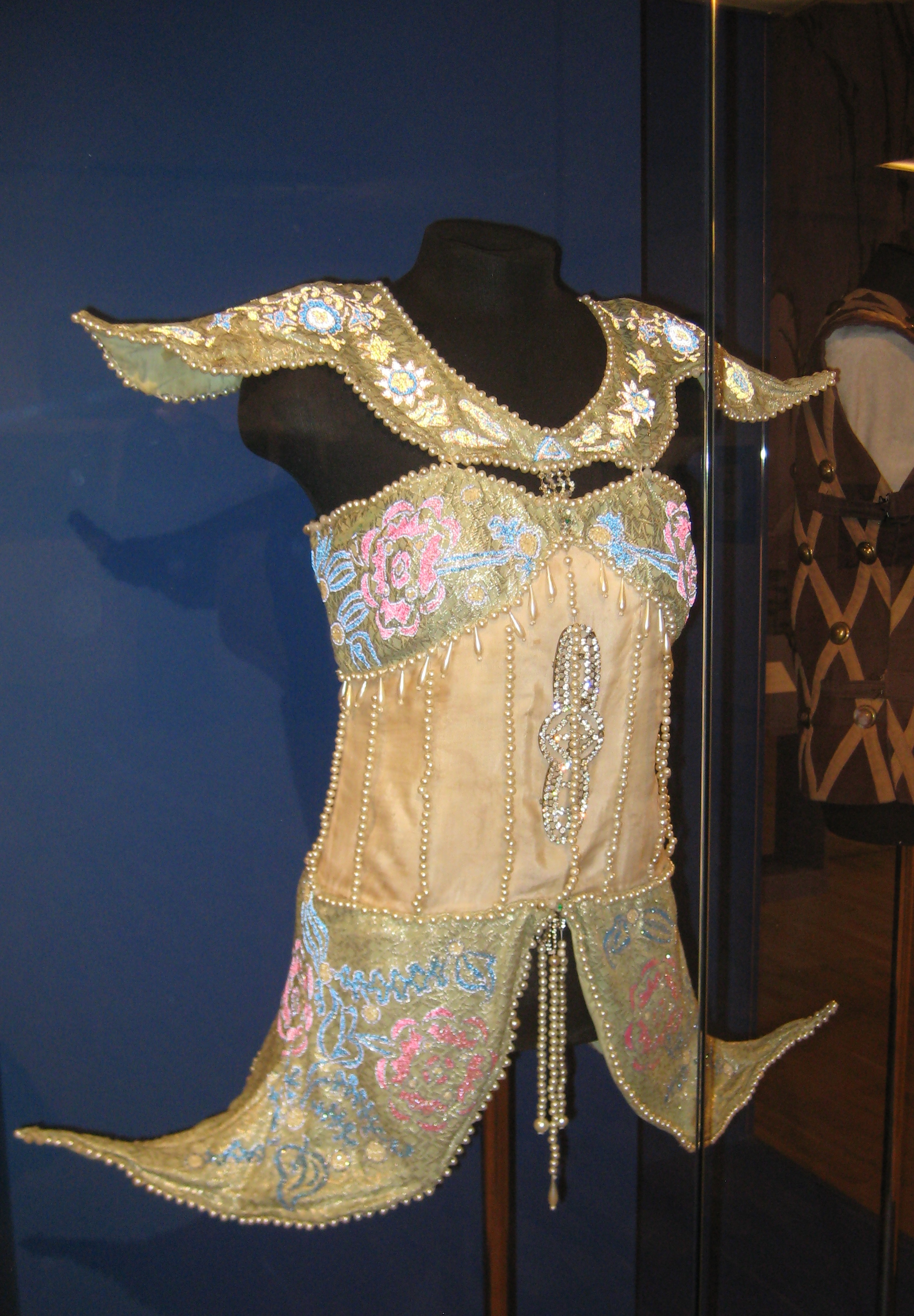 Опера Н.А. Римского-Корсакова "Золотой петушок". Постановка состоялась в августе 1934 года в театре Casino (Виши), Франция. Декорация. ГЦТМ им. А.А. Бахрушина